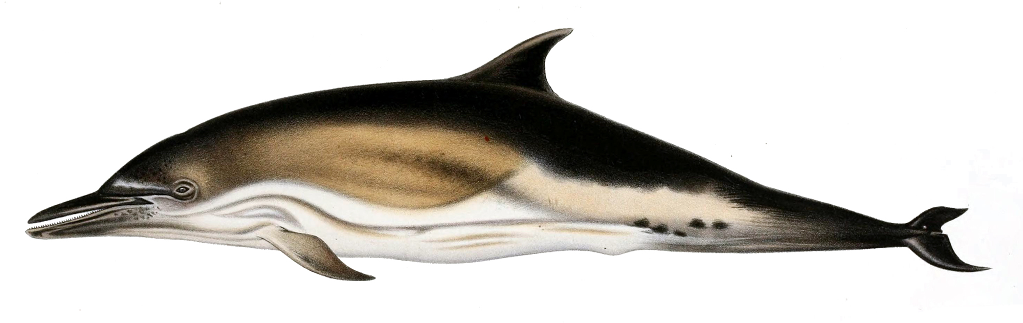 Delphinus delphis